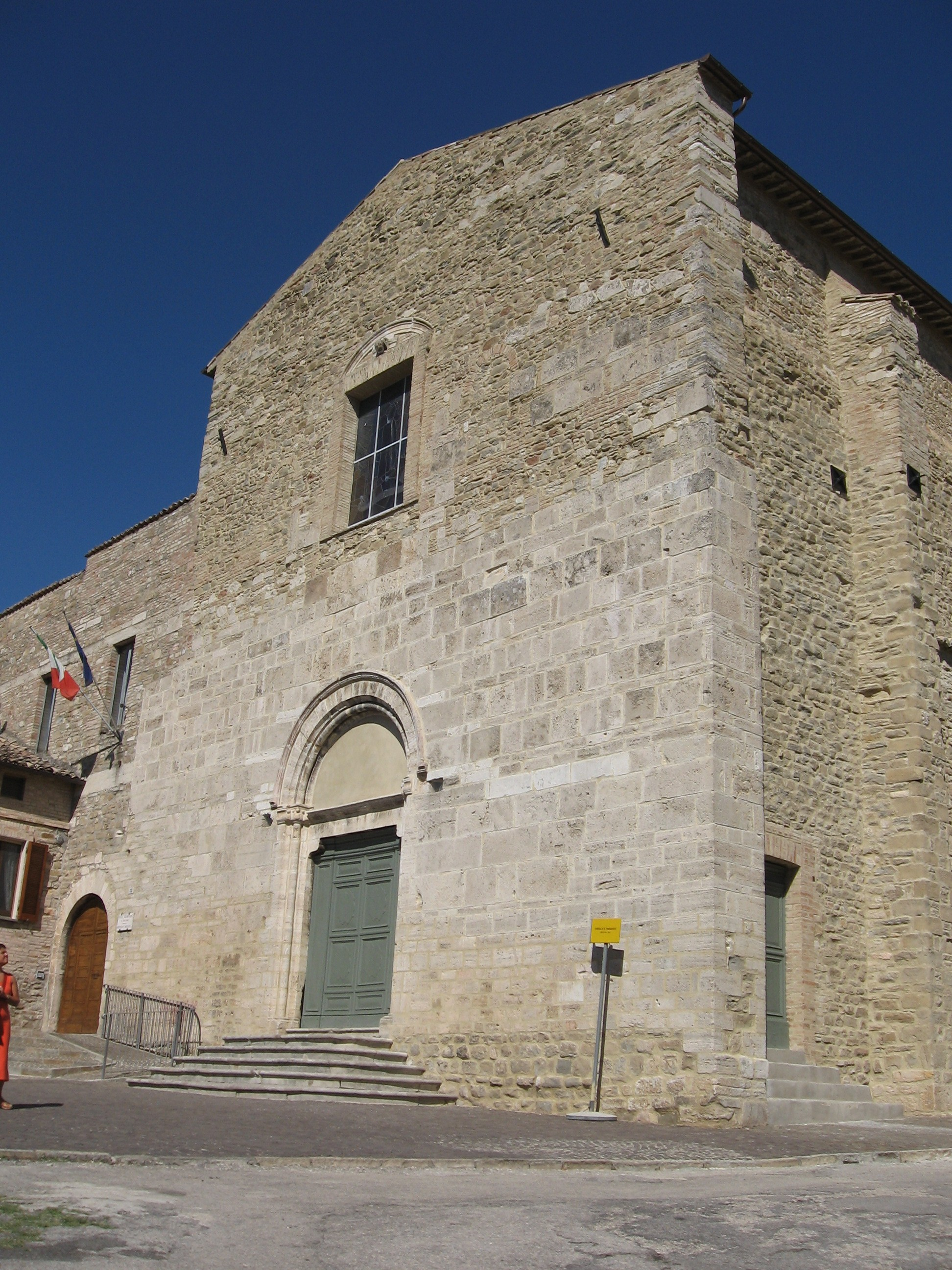 Bevagna, settembre 2006, Chiesa di San Francesco.